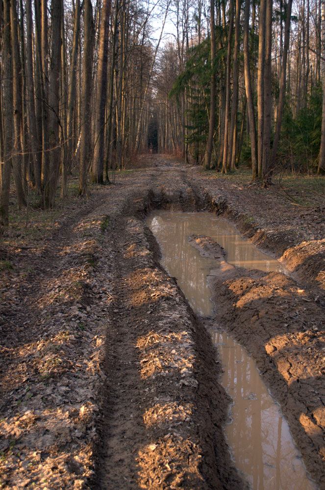 Валуевский лесопарк - колеи от мотовездеходов